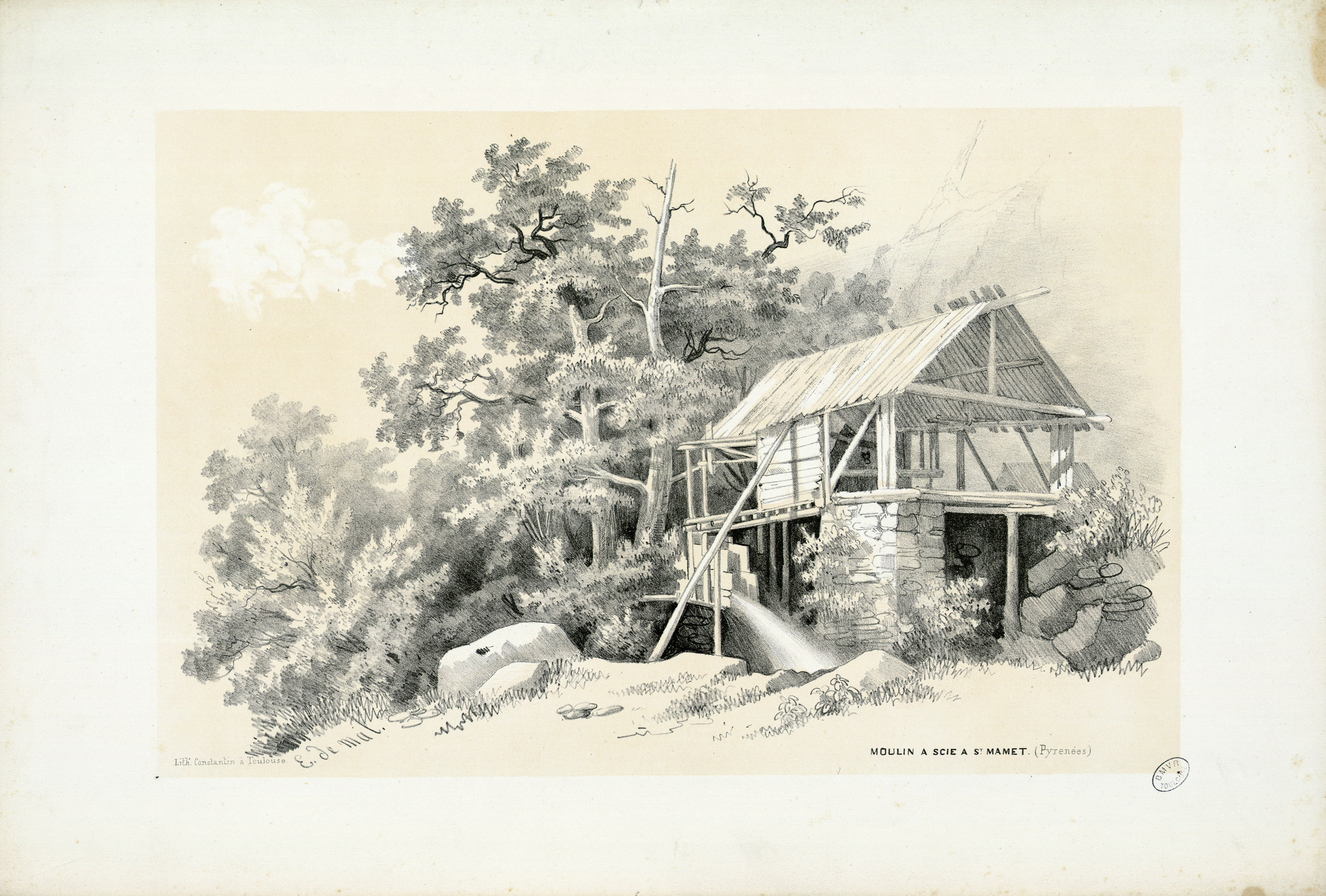 Fait partie d'un recueil de 23 planches lithographiées en camaïeu Ancely, René (1876 - 1966). Possesseur